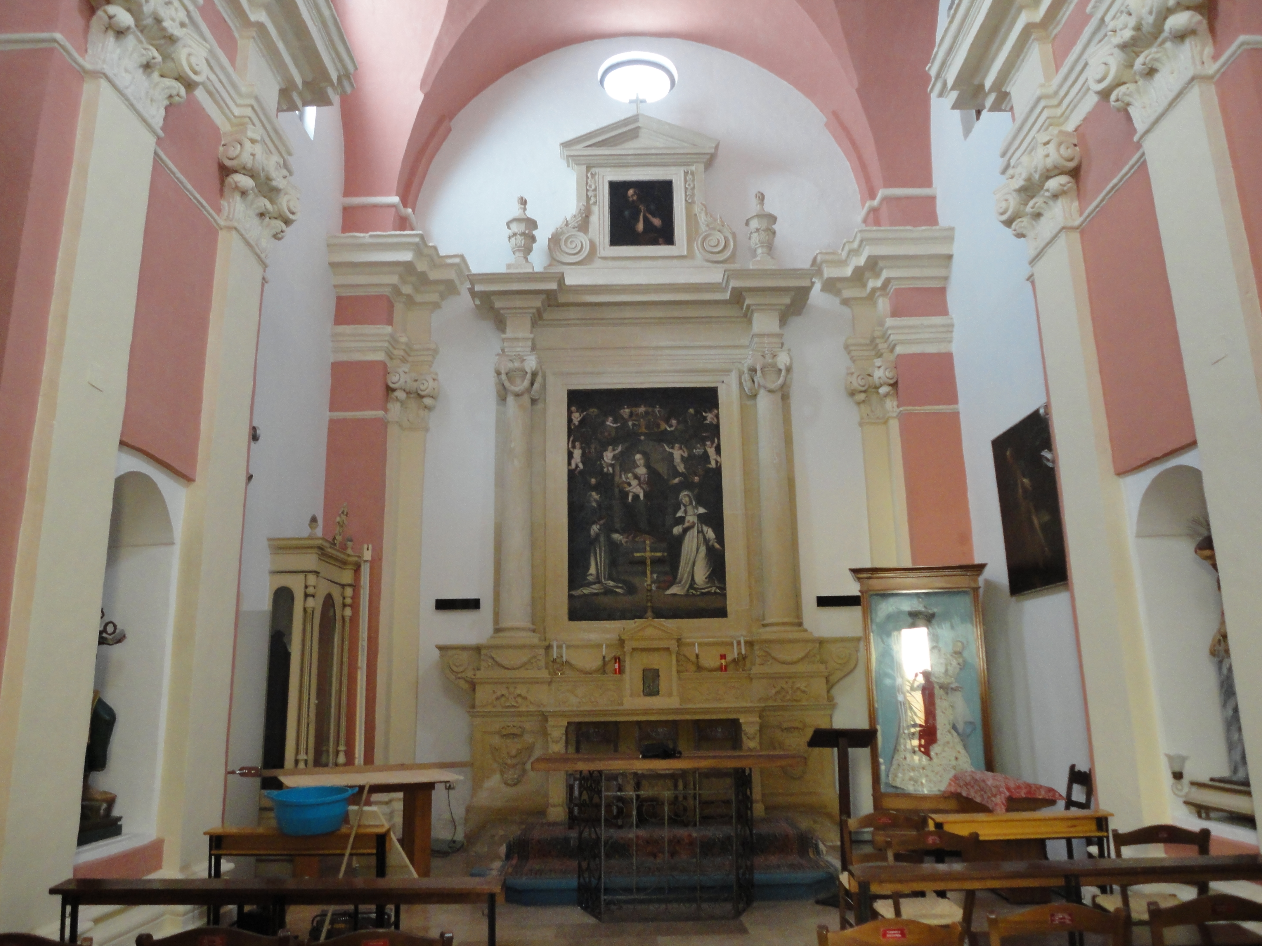 Interno Chiesa San Pietro Apostolo Galatone, Lecce